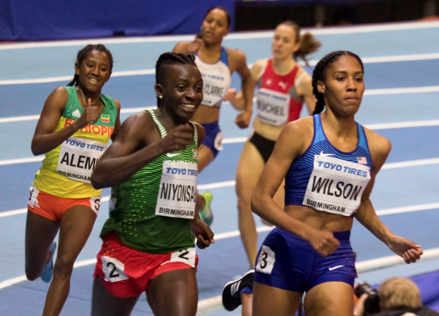 WK040094 finale 800m dames